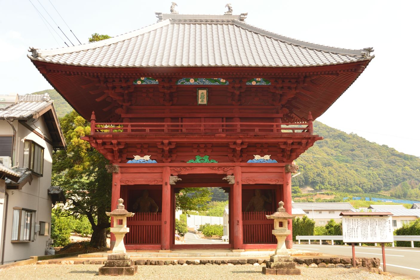 静岡県浜松市北区にある高野山真言宗の寺院の仁王門。